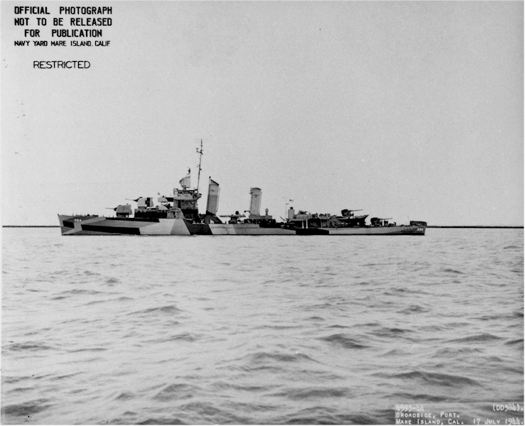 USS Dunlap (DD-384) camouflaged (Dazzle pattern 31)